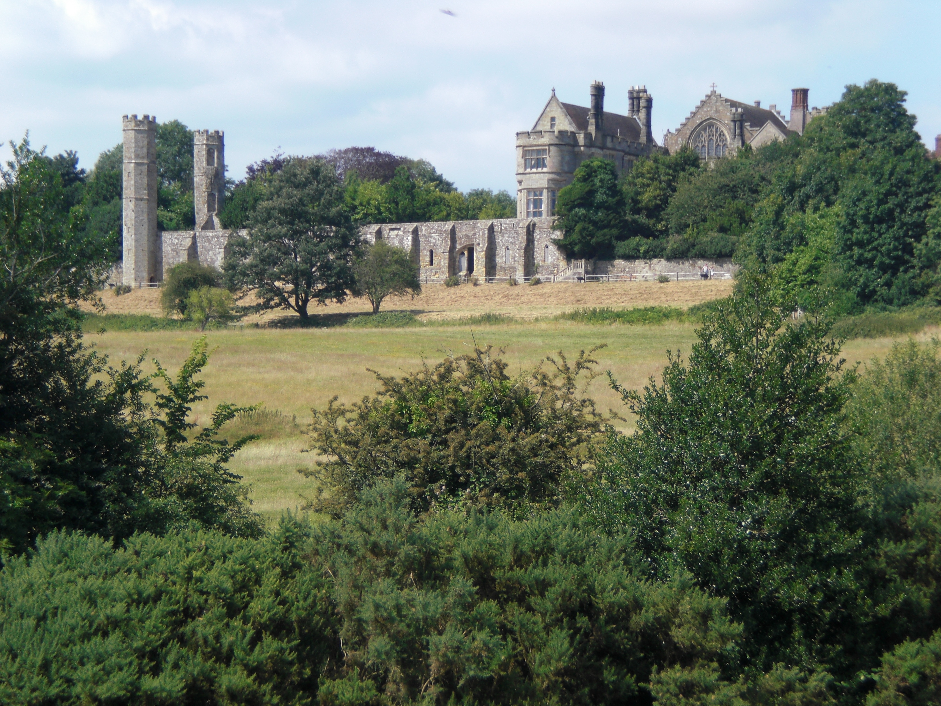 Blick vom Schlachtfeld 1066 auf die Battle Abbey